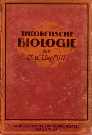 Original 1920 Ausgabe